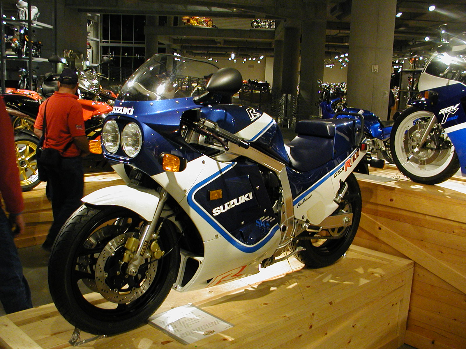 Barber Motorcycle Museum - Oct 22 2006 (93) Suzuki GSX-R1100